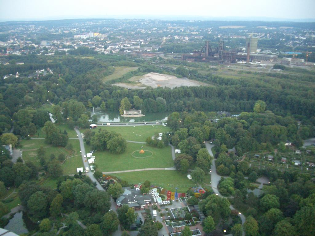 Westfalenpark Dortmund vom Florianturm